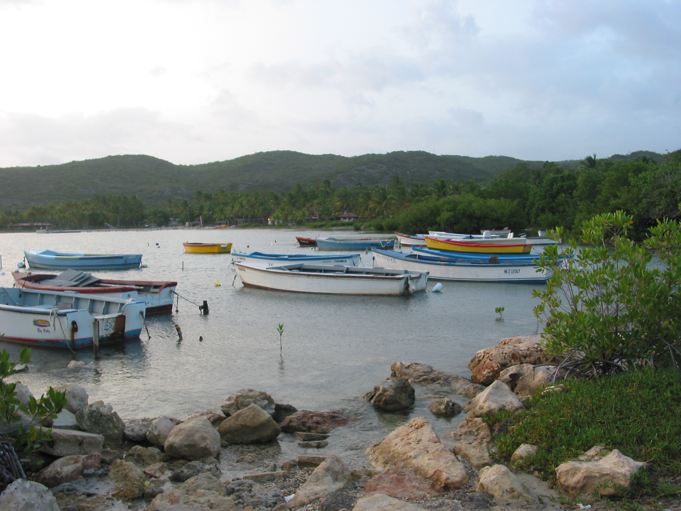 Atardecer en San Jacinto, Guanica